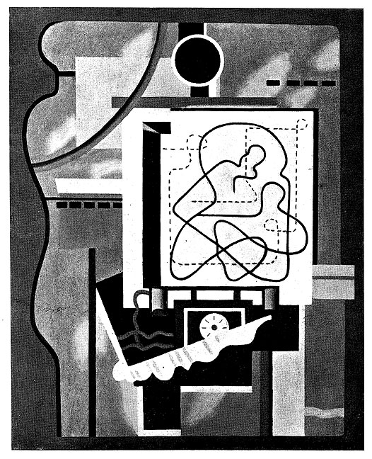 Willi Baumeister: Atelierbild III, 1929, Öl auf Leinwand, 81 x 45 cm